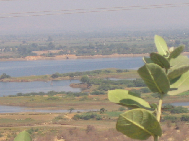 Pejzagxo cxirkaux Bundi